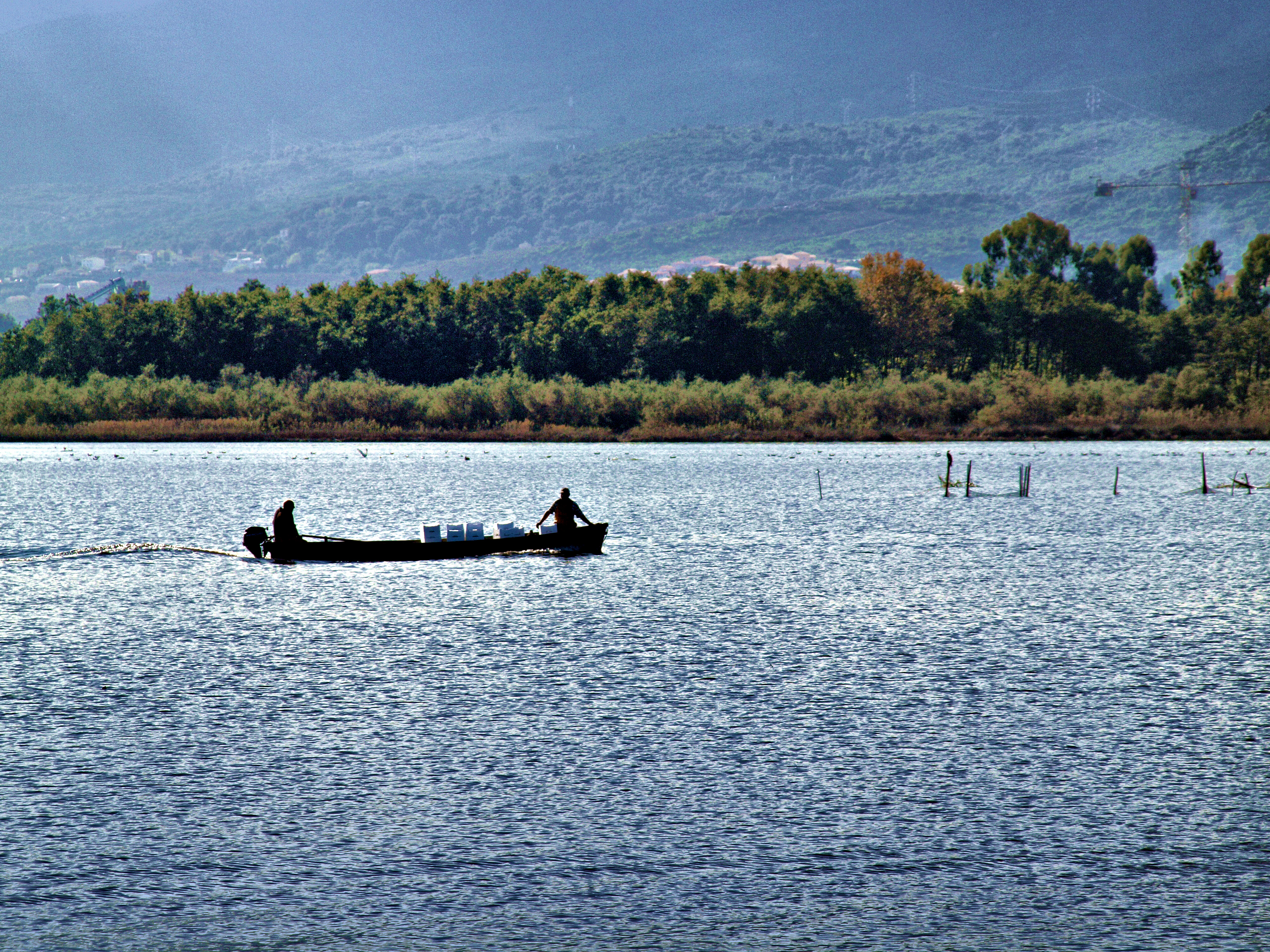 Furiani (Corse) - Pêcheurs rentrant de pêche sur l'étang de Biguglia